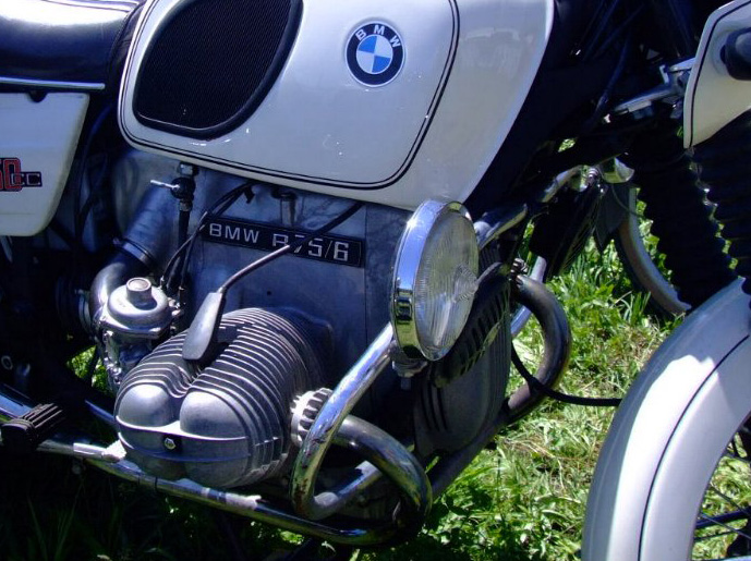 Sturzbügel an einer BMW R 75/6